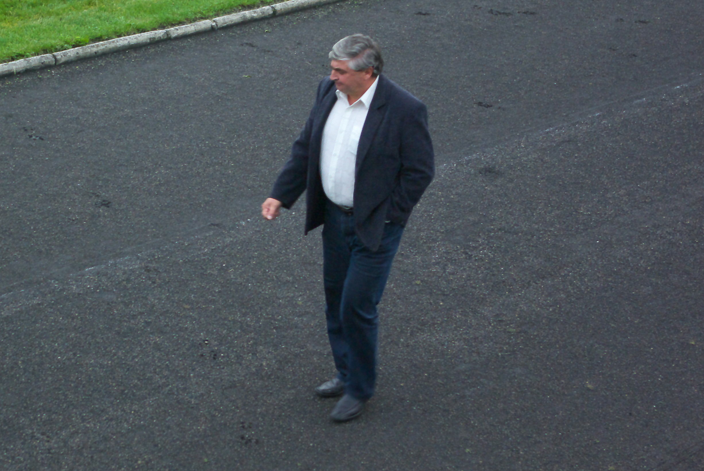 Józef Konieczny, prezes Stali Sanok podcza meczu Stal Sanok - Orlęta Łuków 15.08.2012